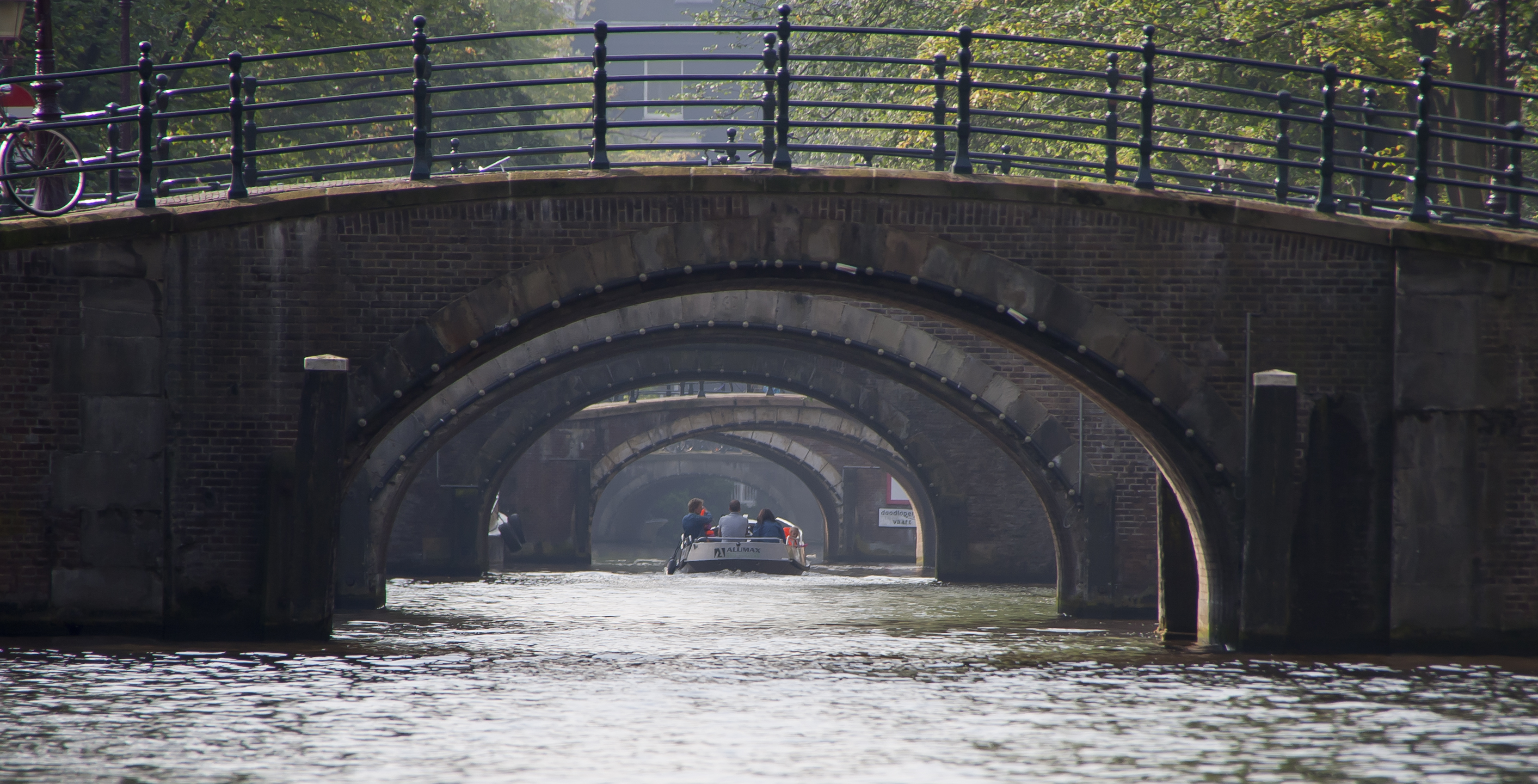 A walk dando un paseo